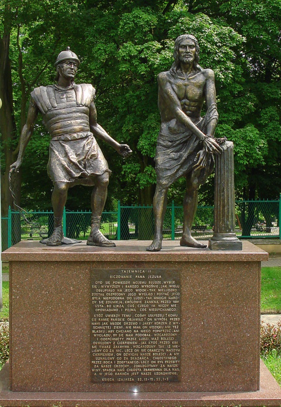 Częstochowa, zespół klasztorny paulinów na Jasnej Górze